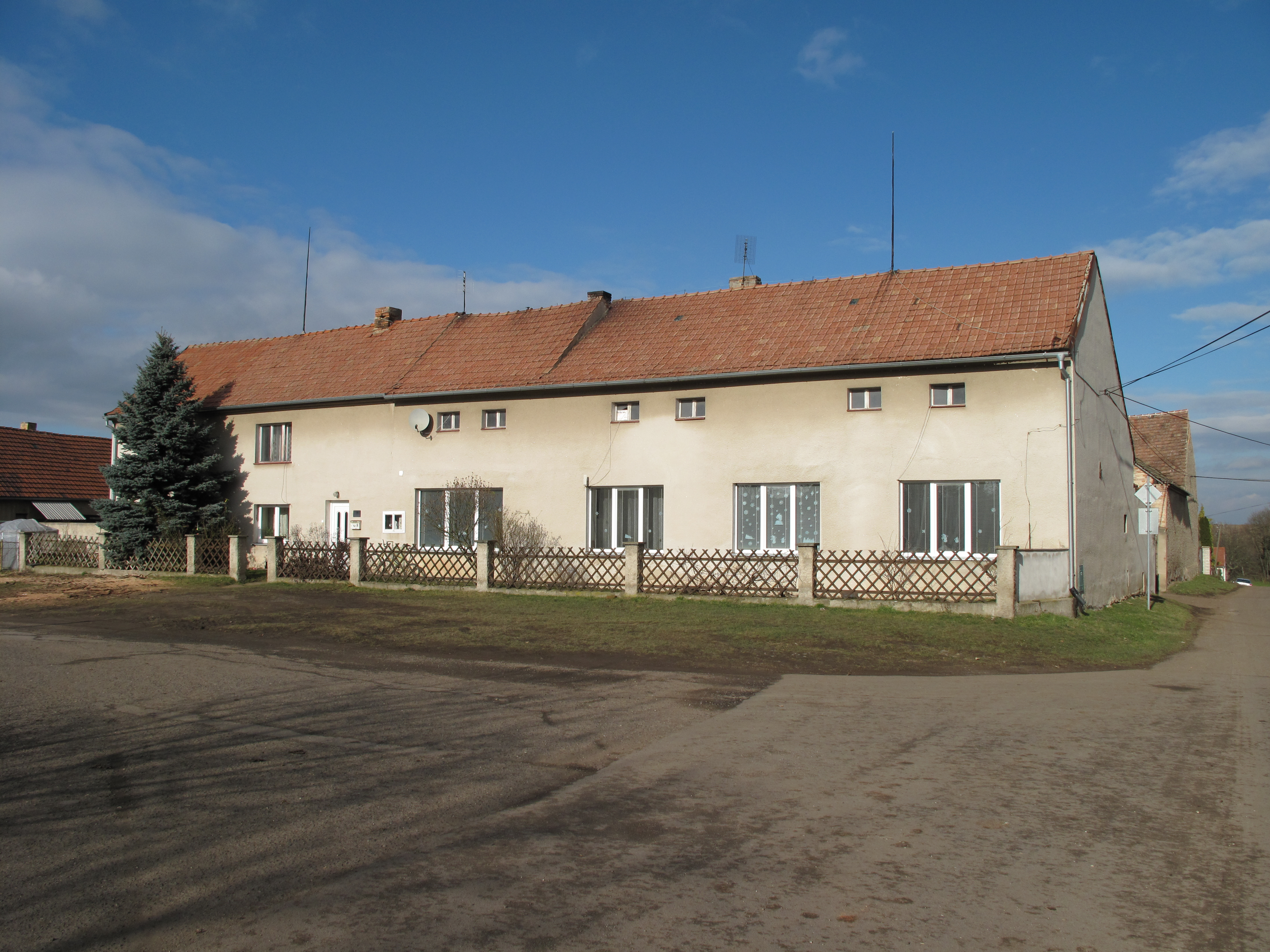 Domy v Pohořicích. Okres Litoměřice, Česká republika.